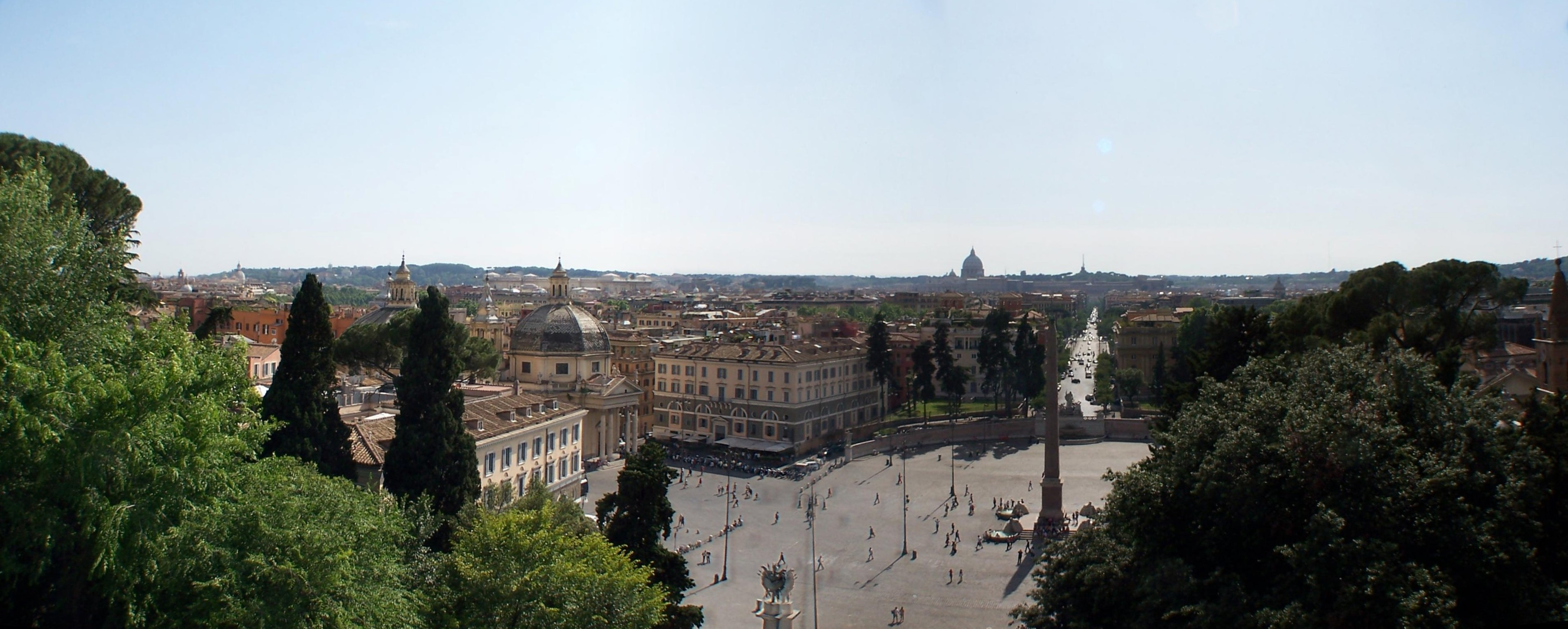 Panorama Paizza del Popolo, hergestellt mit Autostitch